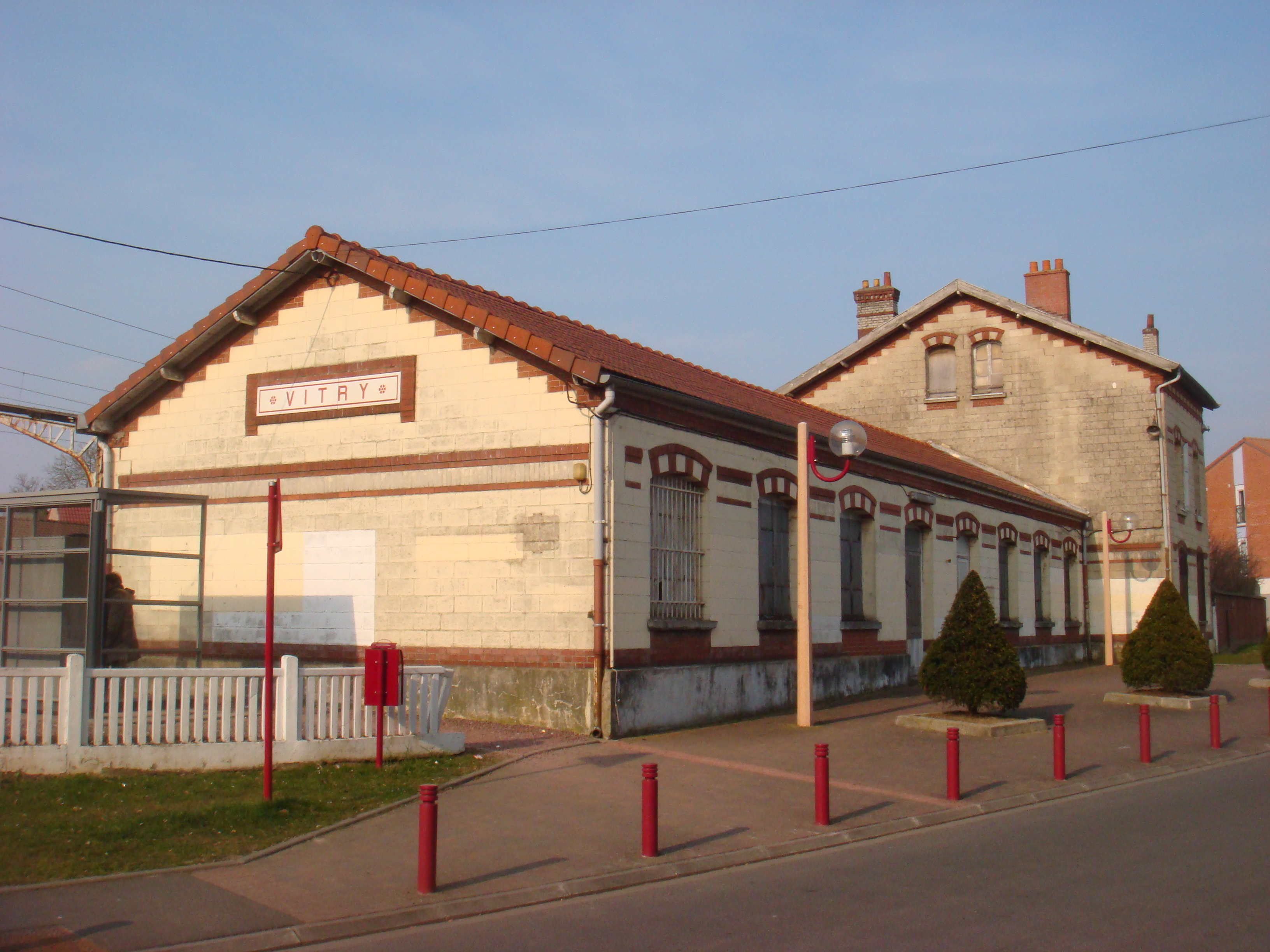 Gare de Vitry en Artois (Pas de Calais), le bâtiment voyageurs construit après la Première Guerre mondiale.